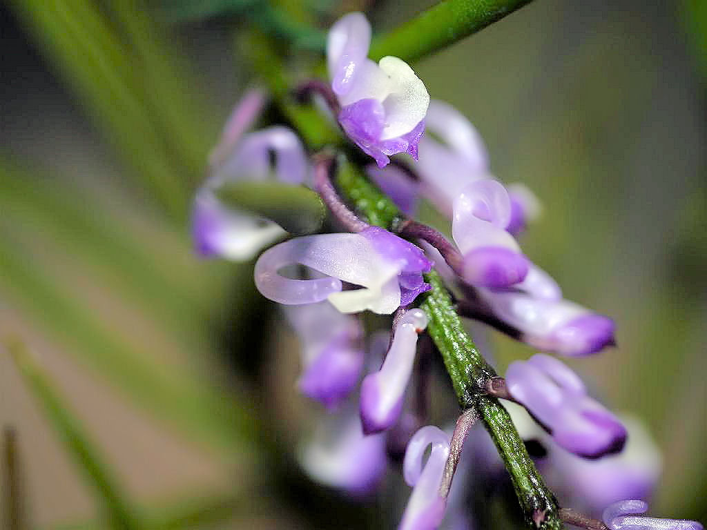 Schoenorchis juncifolia Deep blue